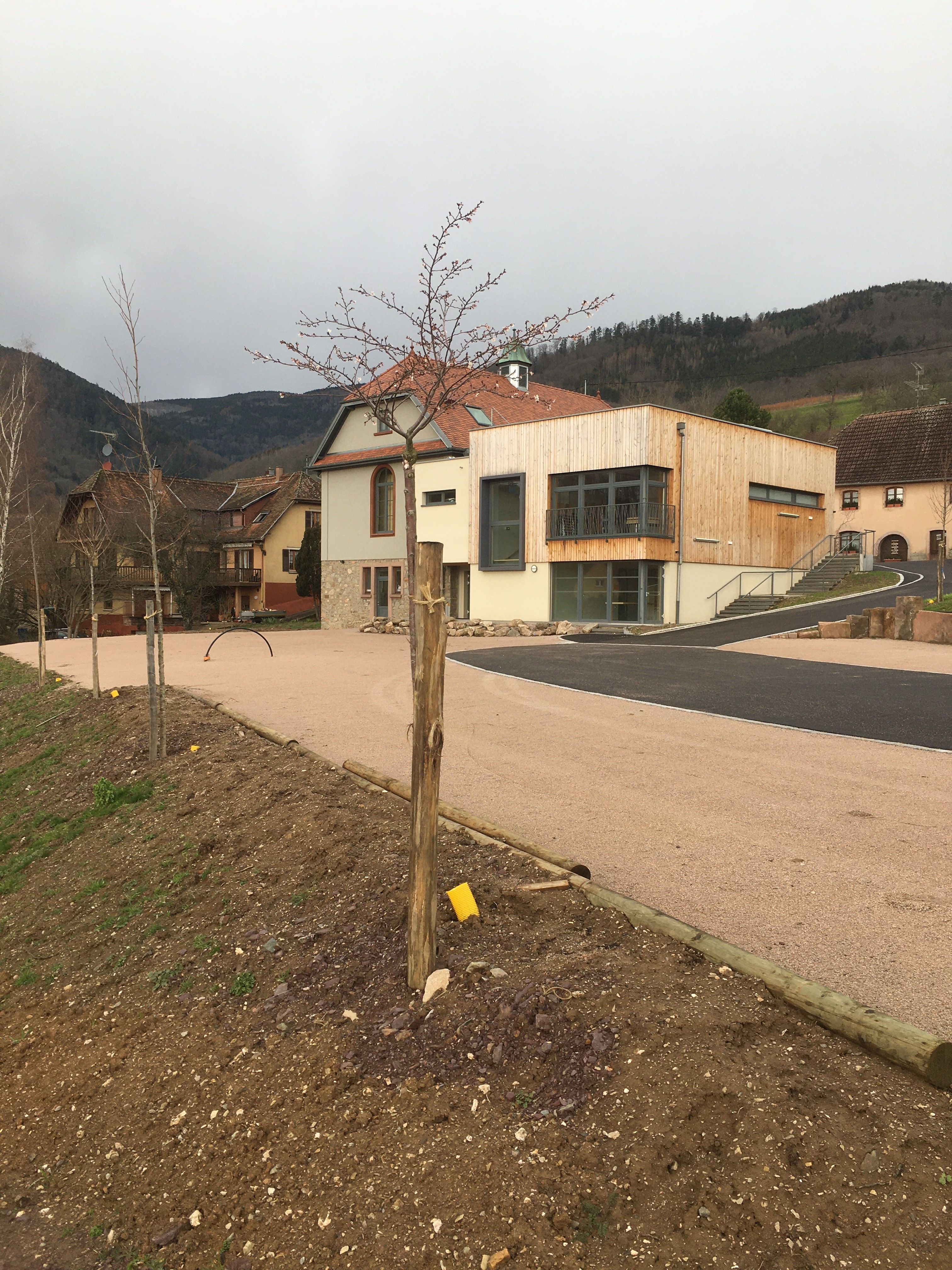 Espace socio- culturel